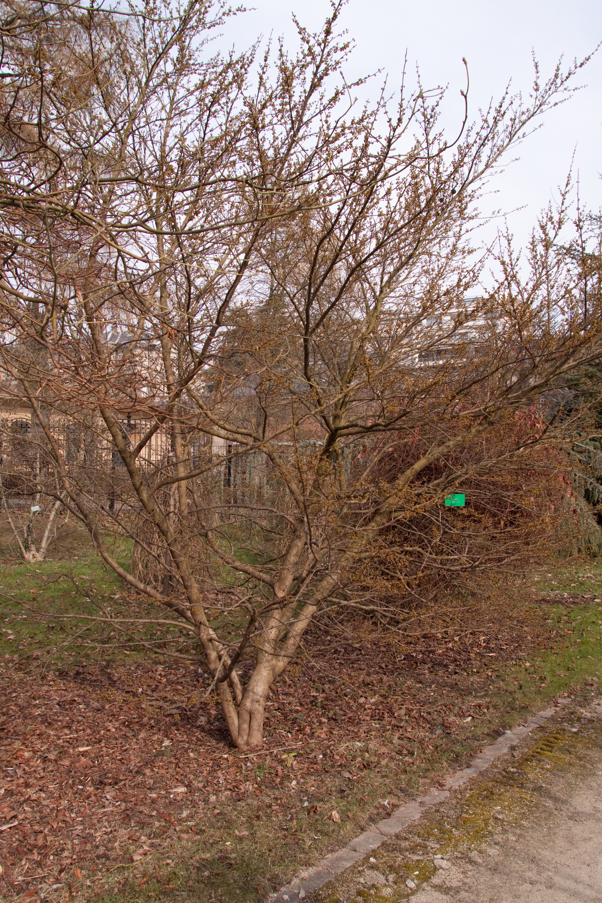 Vue générale de Lindera chienii en fleur - Jardin botanique de Strasbourg - France